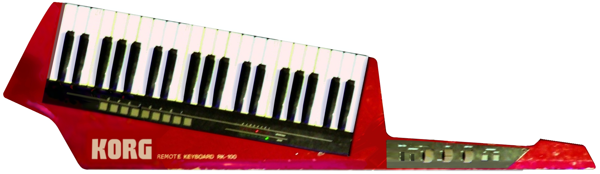 Korg RK-100 remote MIDI keyboard (1984)